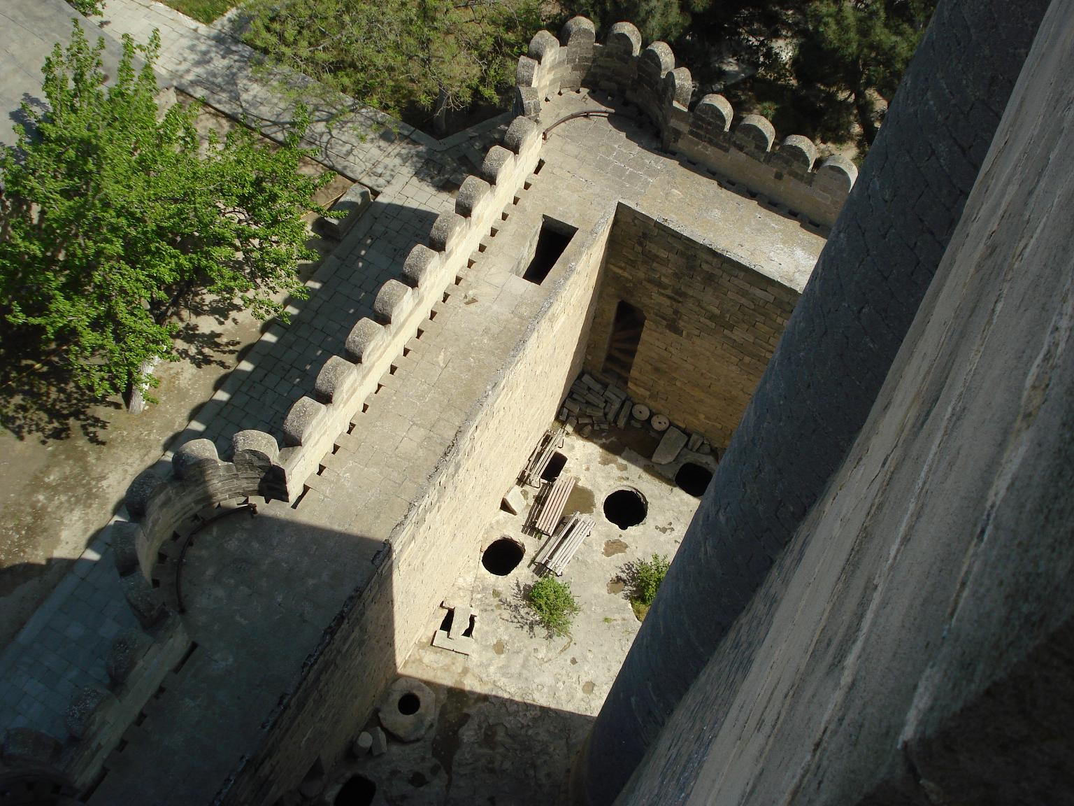 Четырехугольная башня в Мардакян (вид сверху)